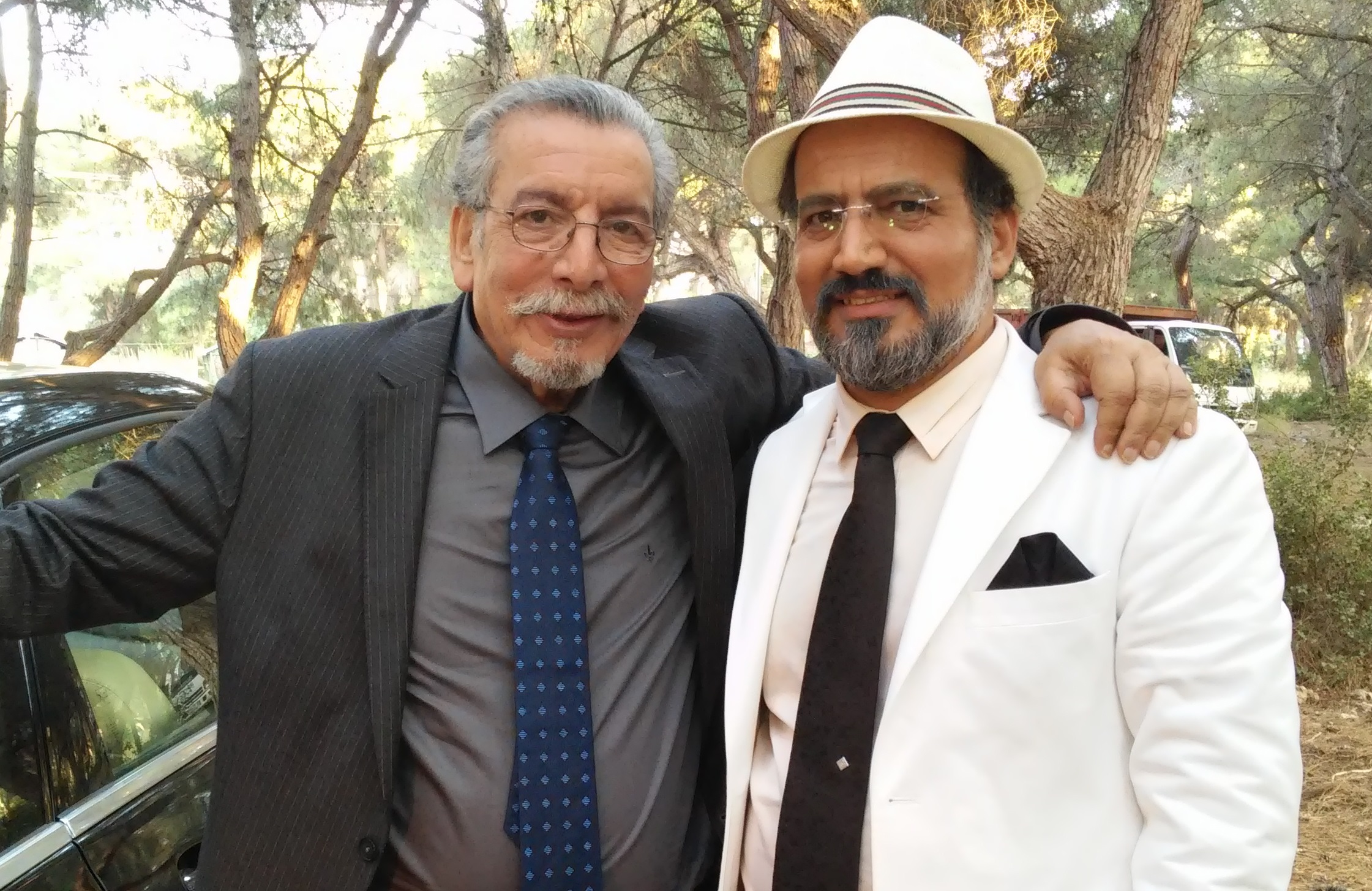 Bahman Mofid - Adin(Abolfazl) Attar